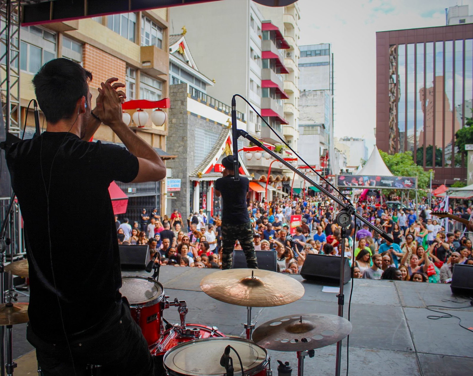 Avant ao vivo na Virada Black. Praça da Liberdade Japão em São Paulo / SP